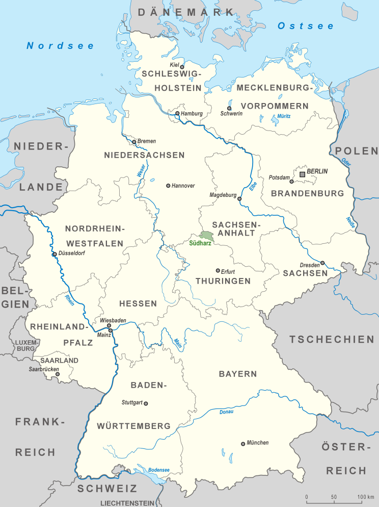 Karte des Naturparks Südharz in Deutschland